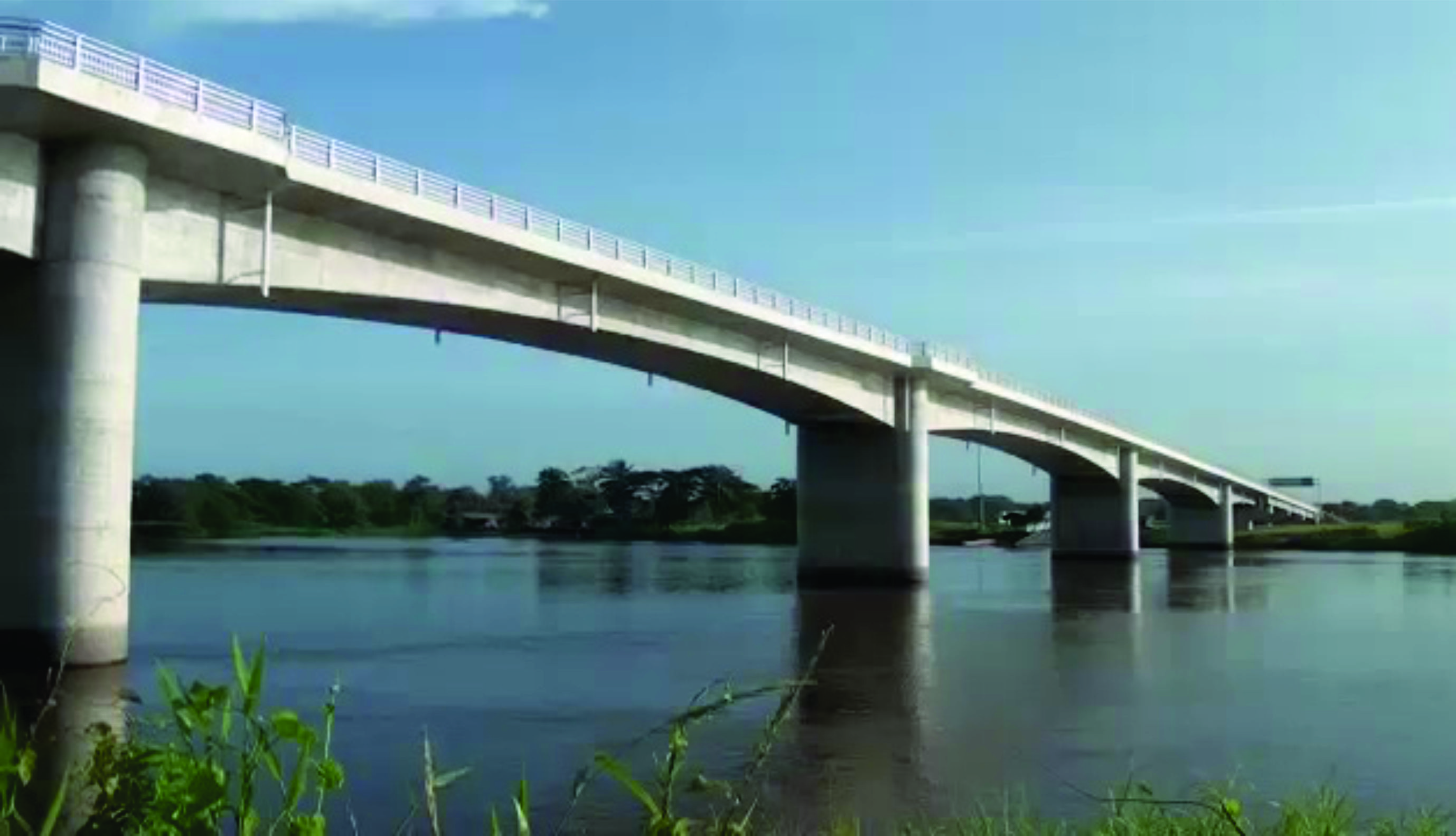 Una vista del puente Santa Fe